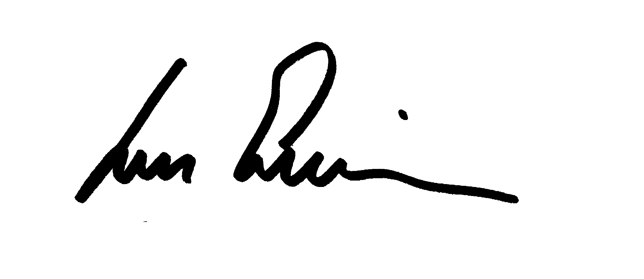 Unterschrift von Joachim Erwin aus dem Jahr 2008.